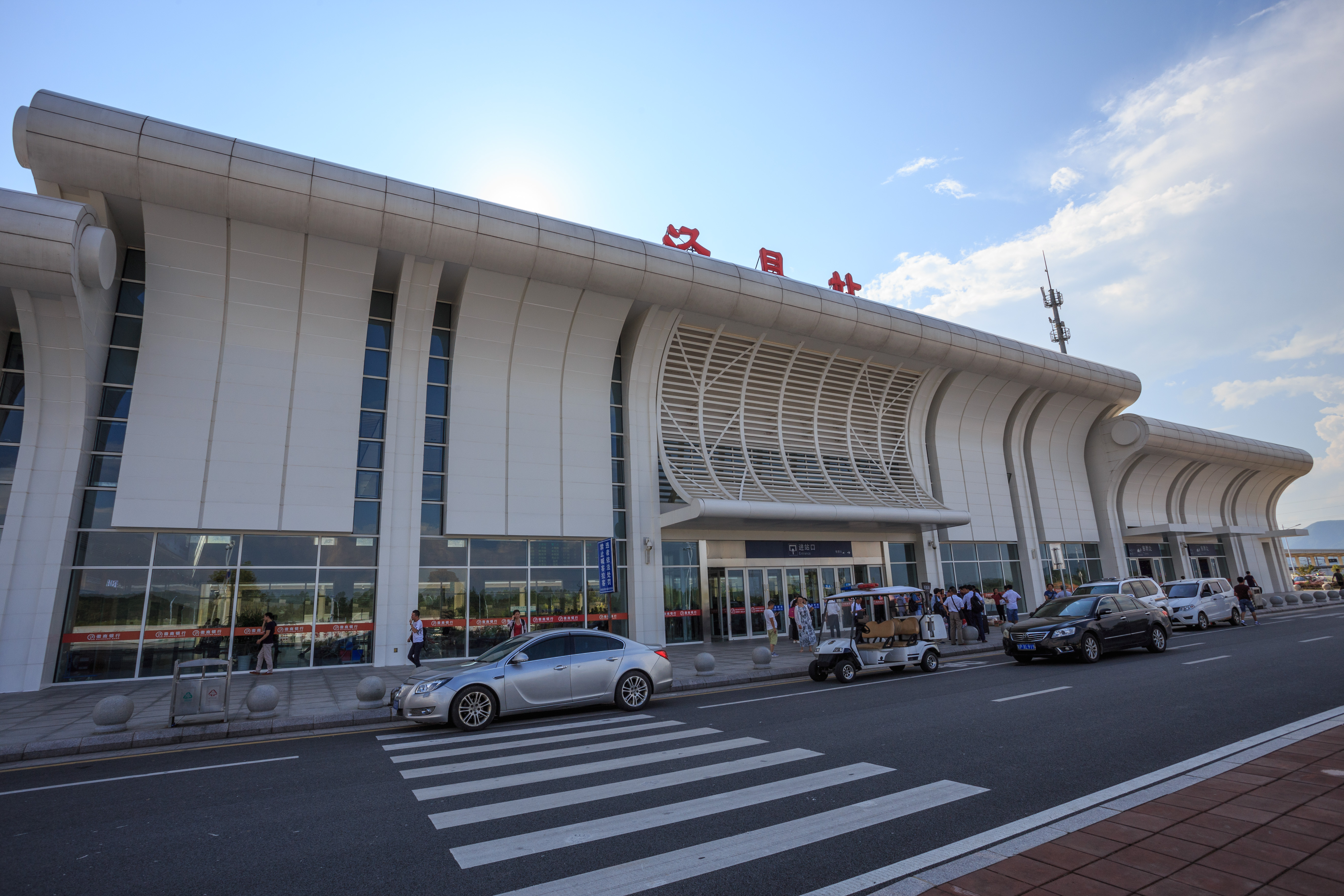 泾县站